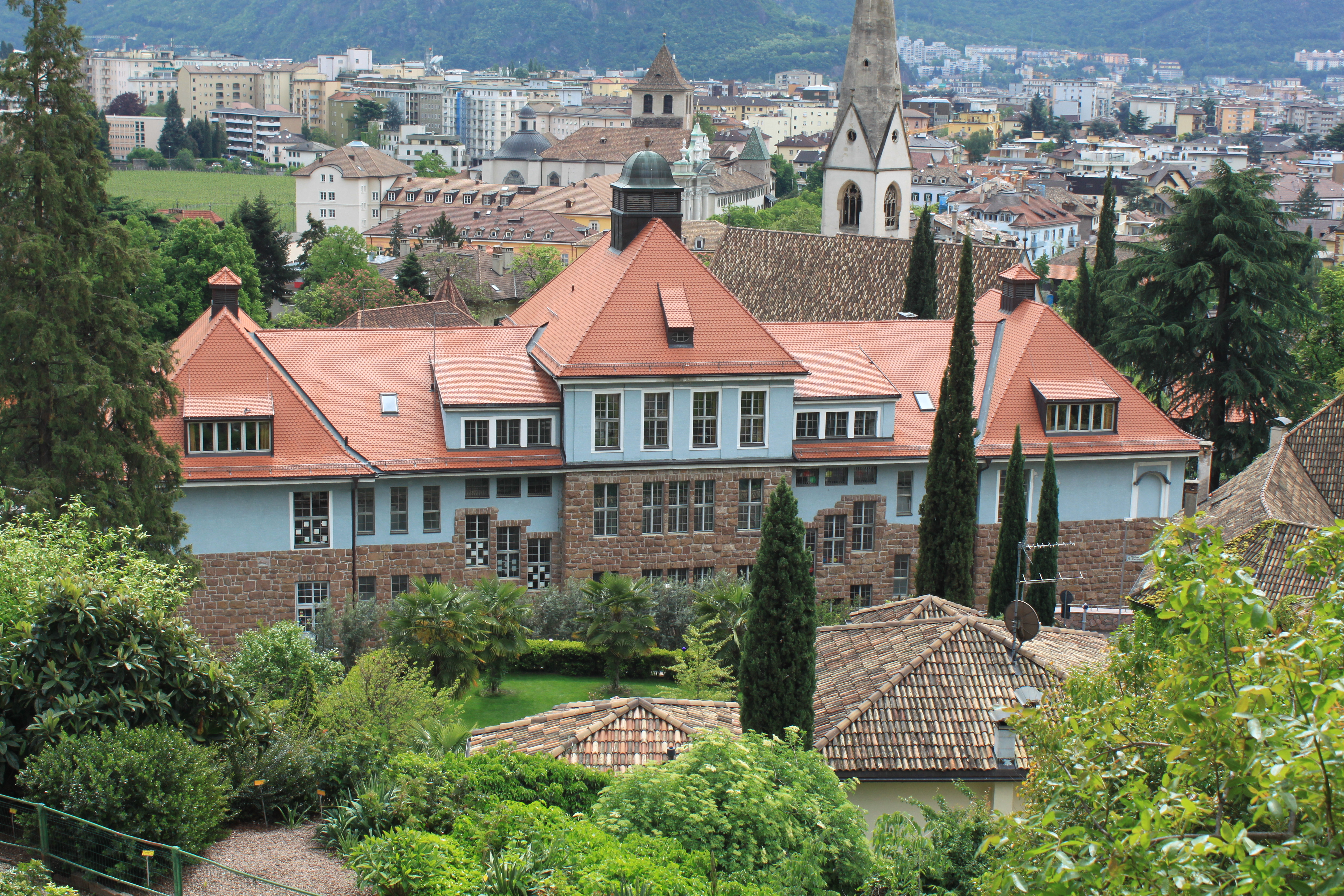 Grundschule Gries (Nordansicht)